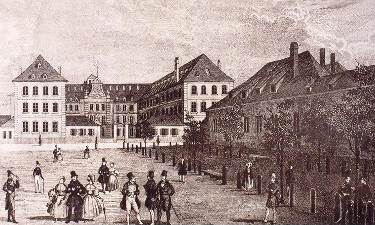 L'ancienne Académie de Strasbourg située à l'emplacement de l'école des arts décoratifs actuelle. Bibliothèque nationale et universitaire de Strasbourg